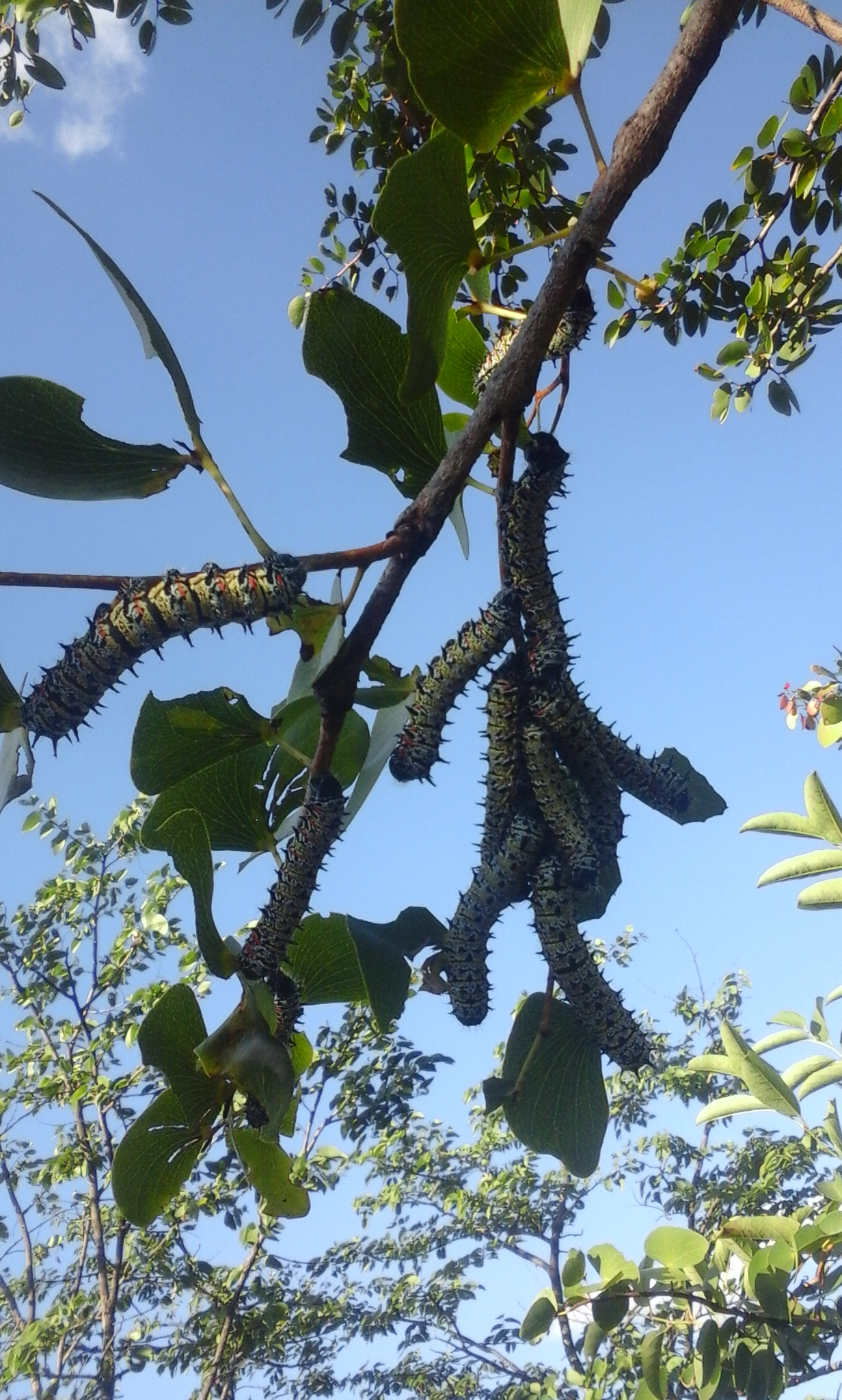 Setswana: Sebokwana sa phane